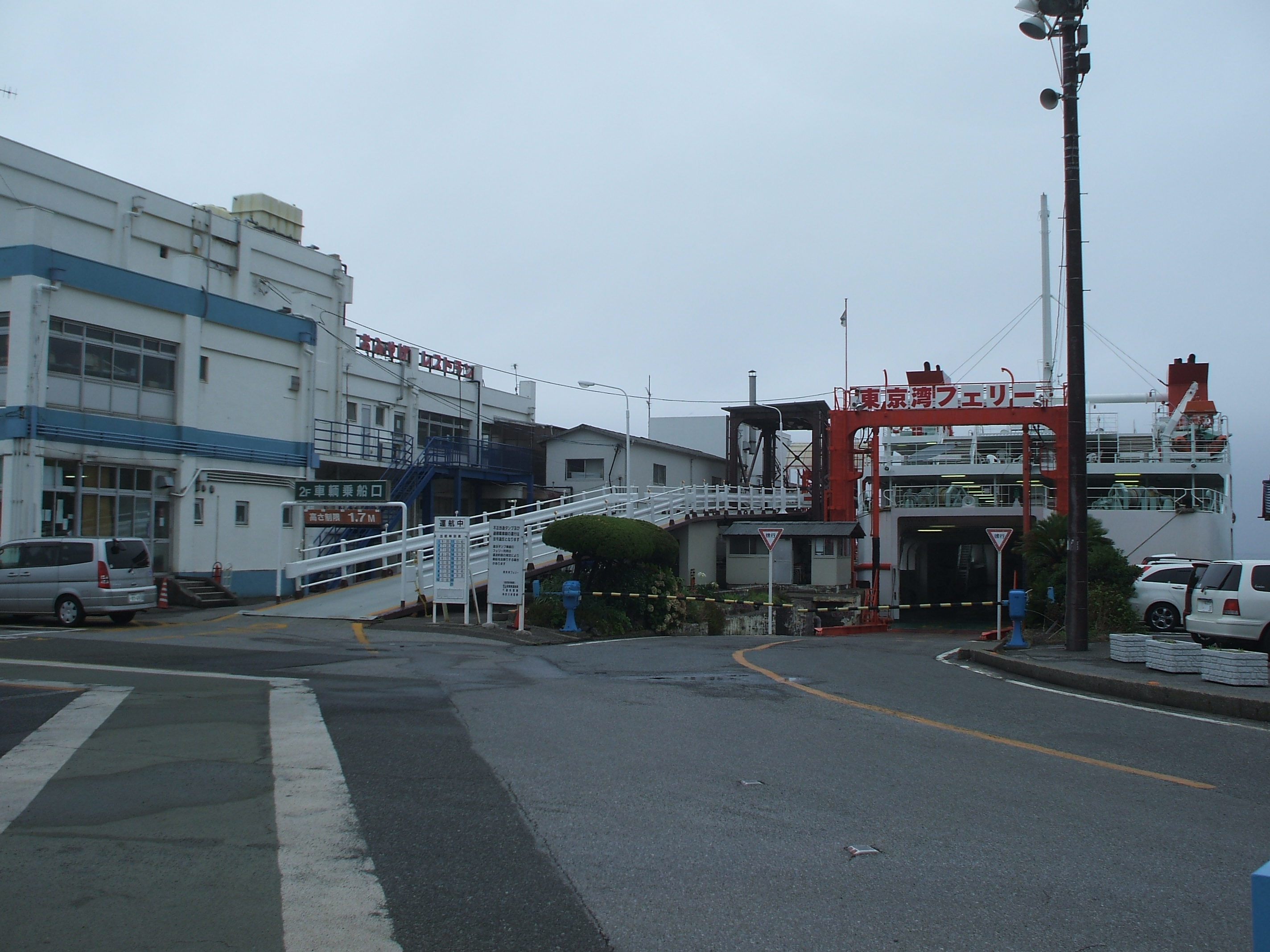 千葉県富津市にある金谷港の東京湾フェリー乗り場